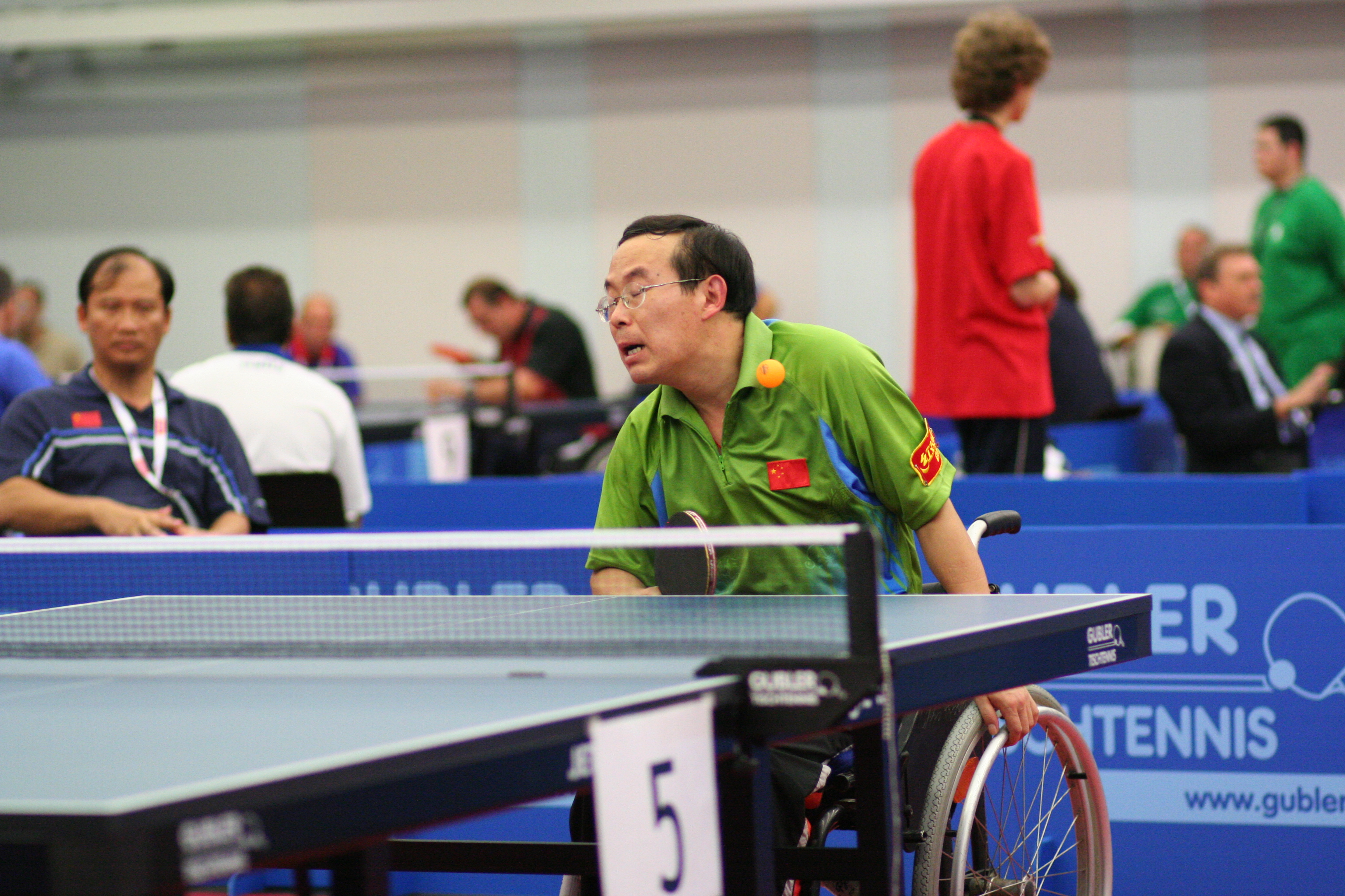 Jie Zhang (China)